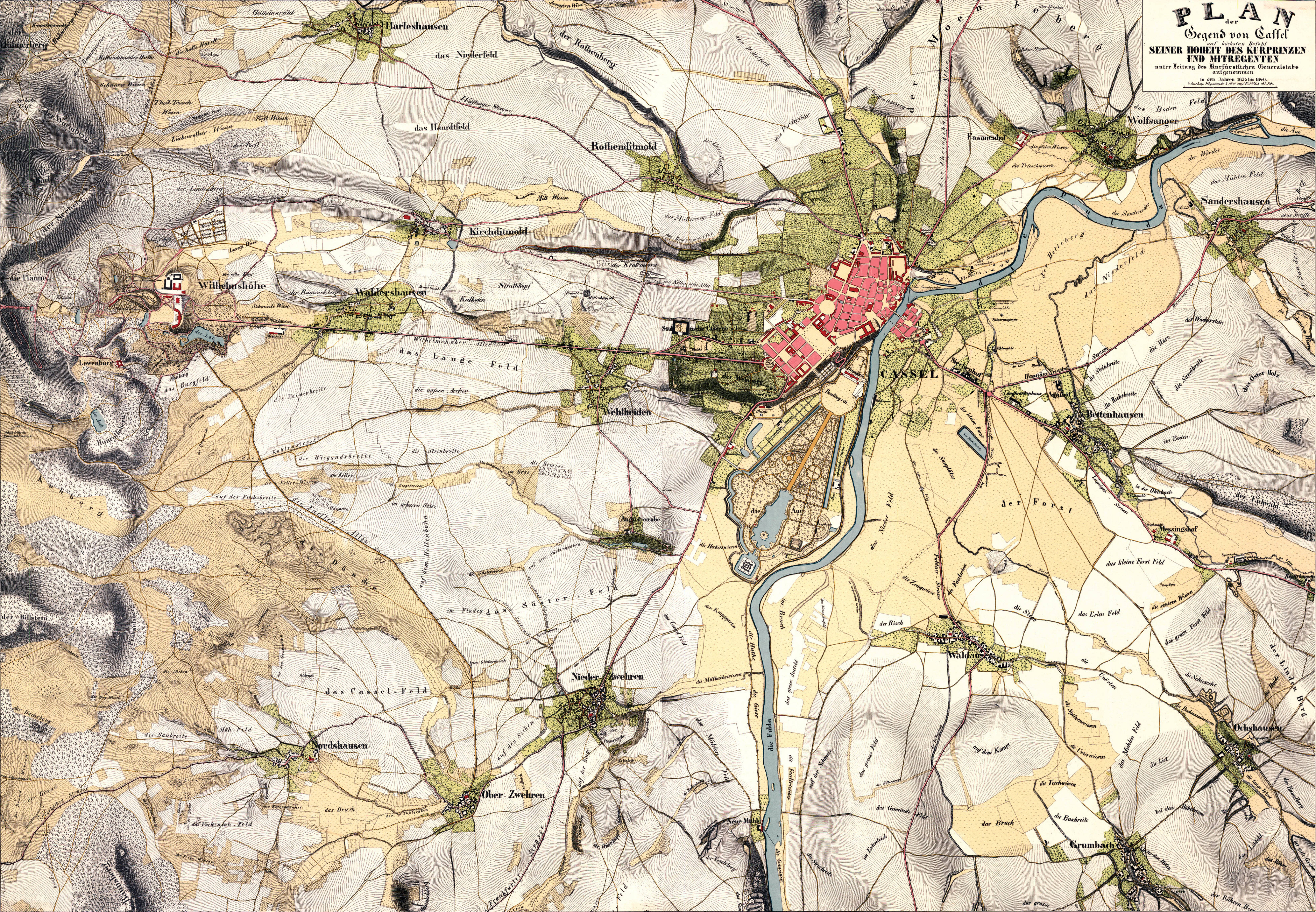 Cassel um 1840